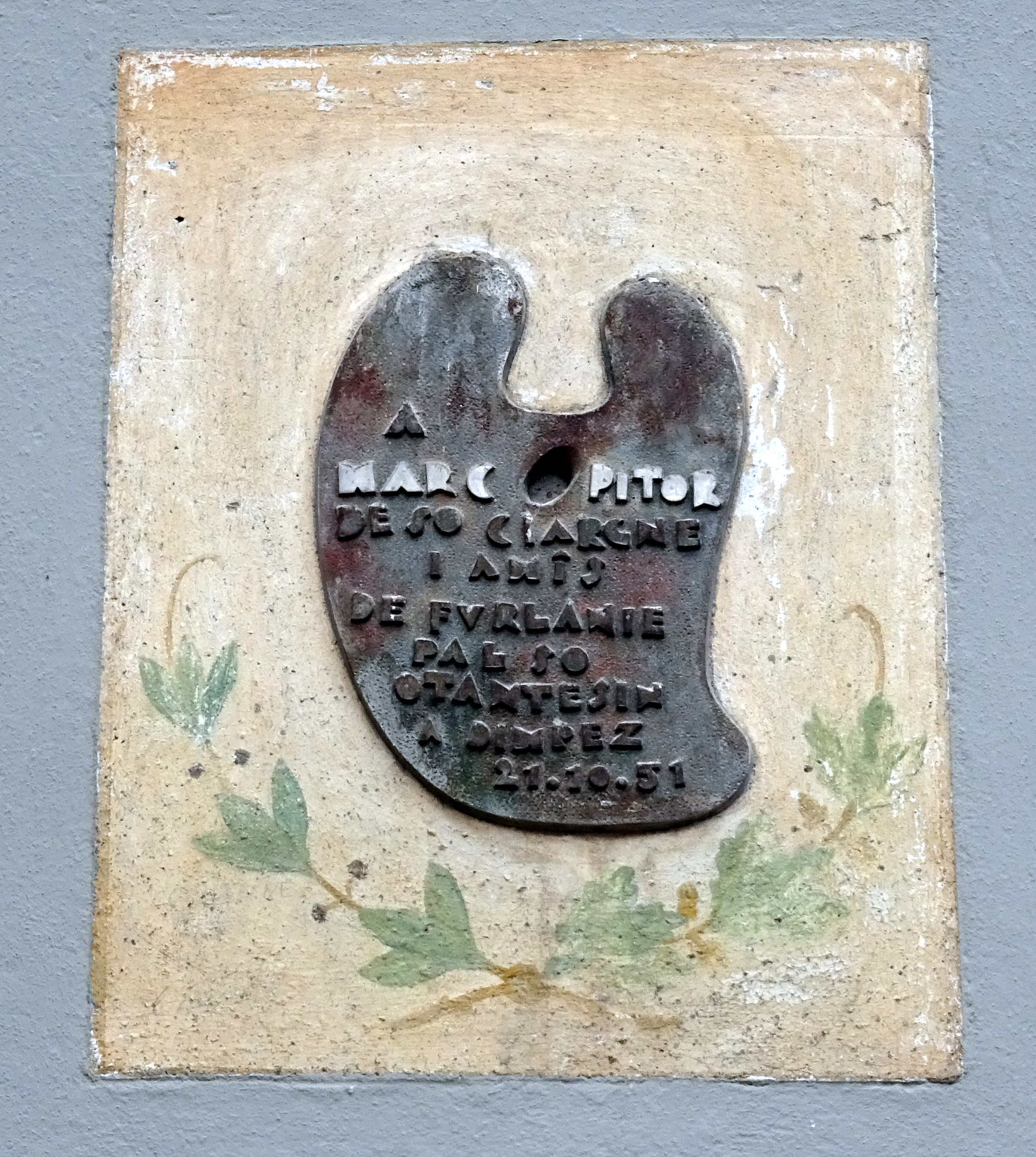 Tavolozza sulla facciata della casa del pittore Marco Davanzo, regalo dei suoi amici